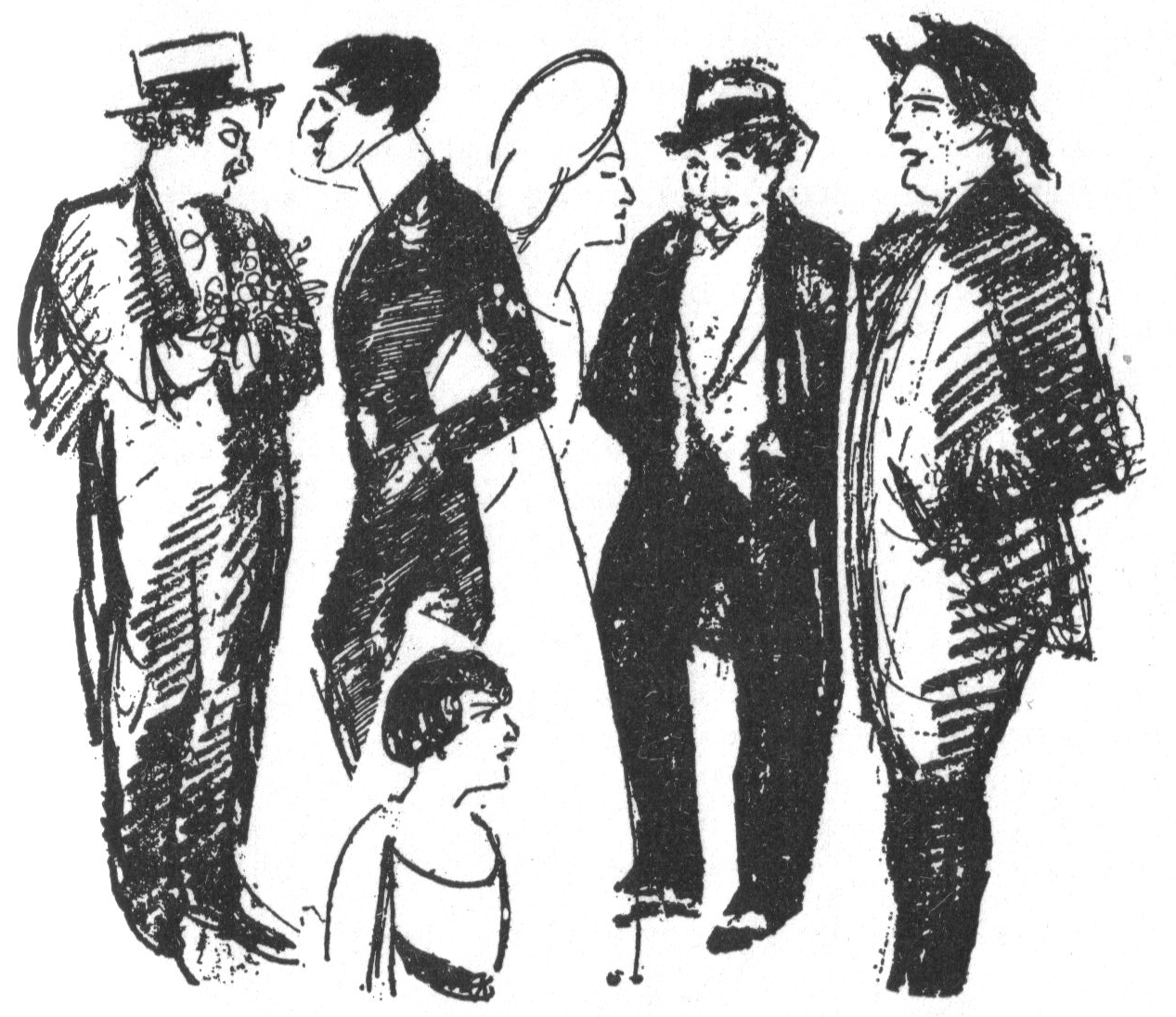 Fra oppsetningen av Gunnar Heibergs "Gerts have" på Nationaltheatret i 1917. Fra venstre Hauk Aabel som Seeman, Ingolf Schanche som Fransen, Gerda Ring som Charlotte, Gerd Egede-Nissen som fru Løven, David Knudsen som Bonnevie og Gunnar Tolnæs som Løven. Tegnet av Henrik Rom.